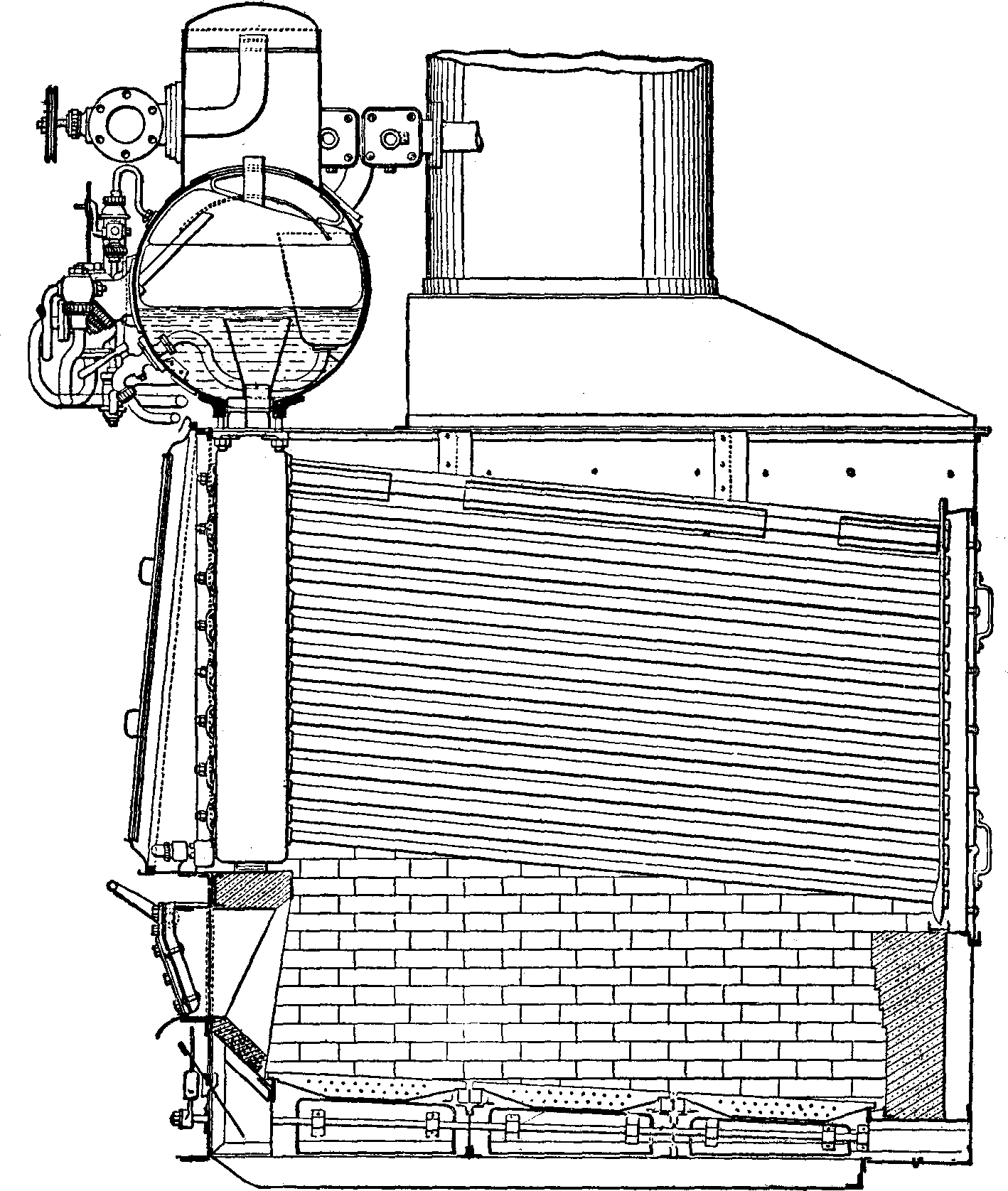 Niclausse boiler